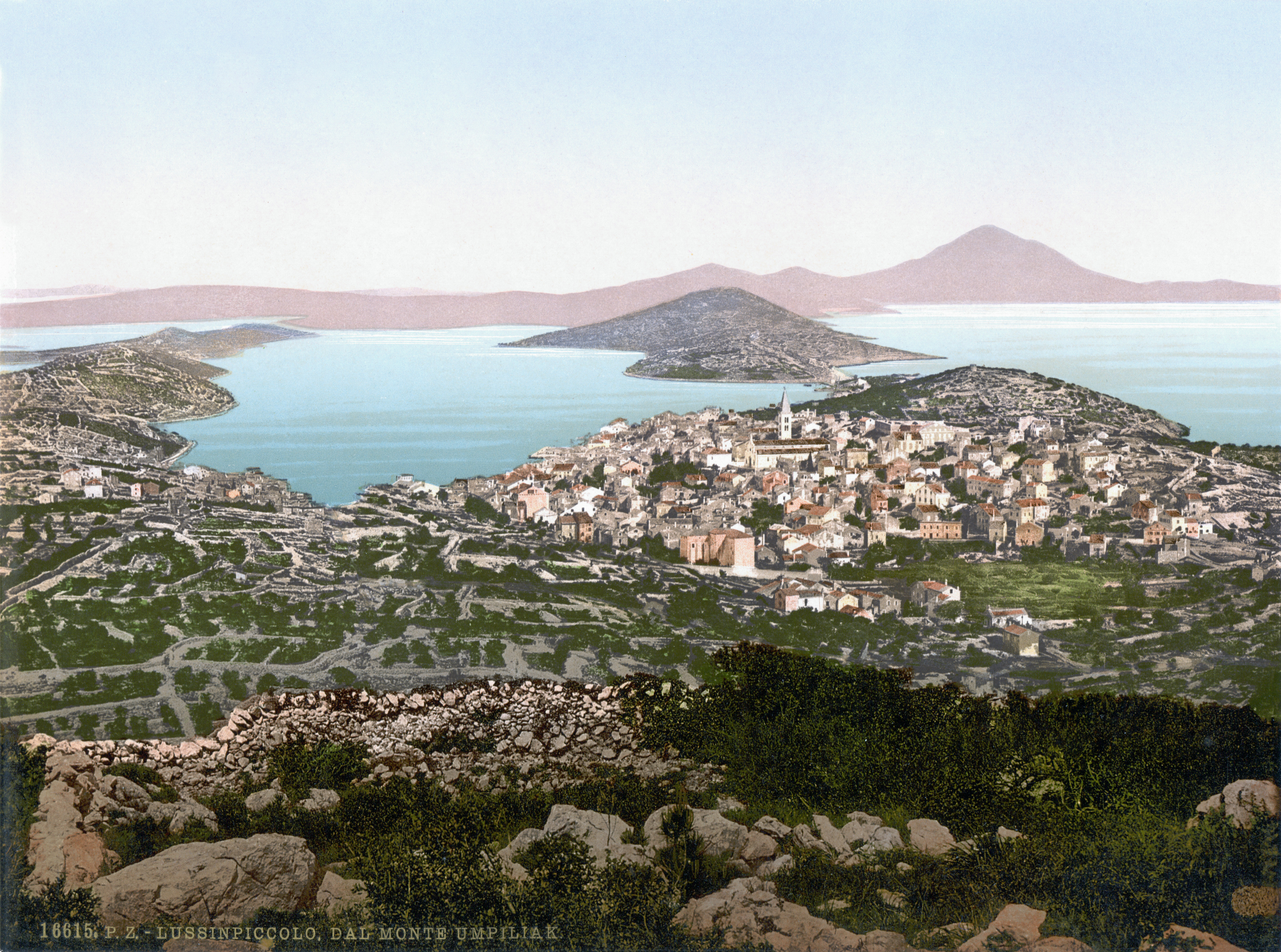 Mali Lošinj/Lussinpiccolo um 1900